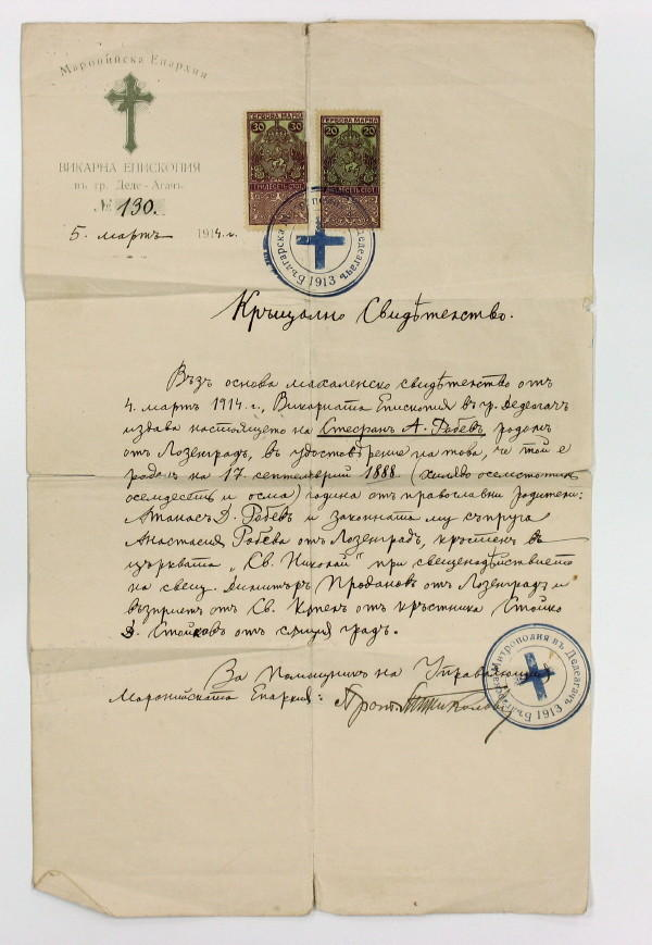 Кръщелно от Маронийската епархия, викарна епископия в Дедеагач